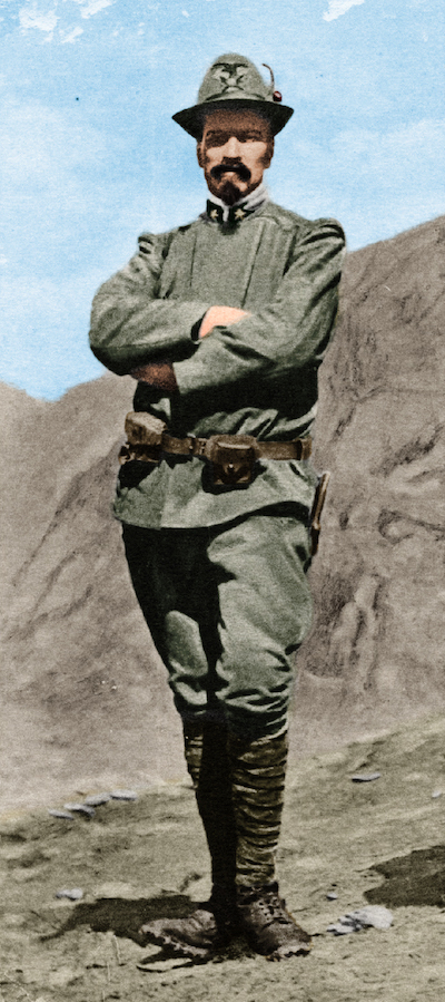 Cesare Battisti sull Forcella del Montozzo nel 1915 (fotografia colorata).